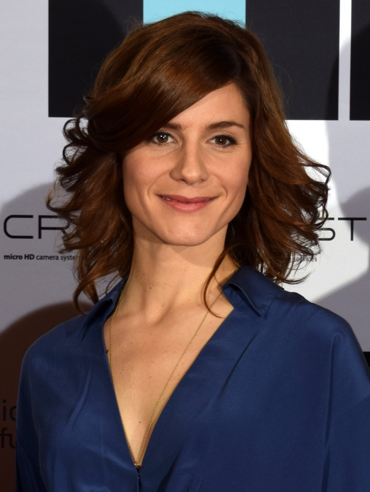 Christina Hecke Deutsche Akademie für Fernsehen - Symposium und Preisverleihung 2015 in Köln